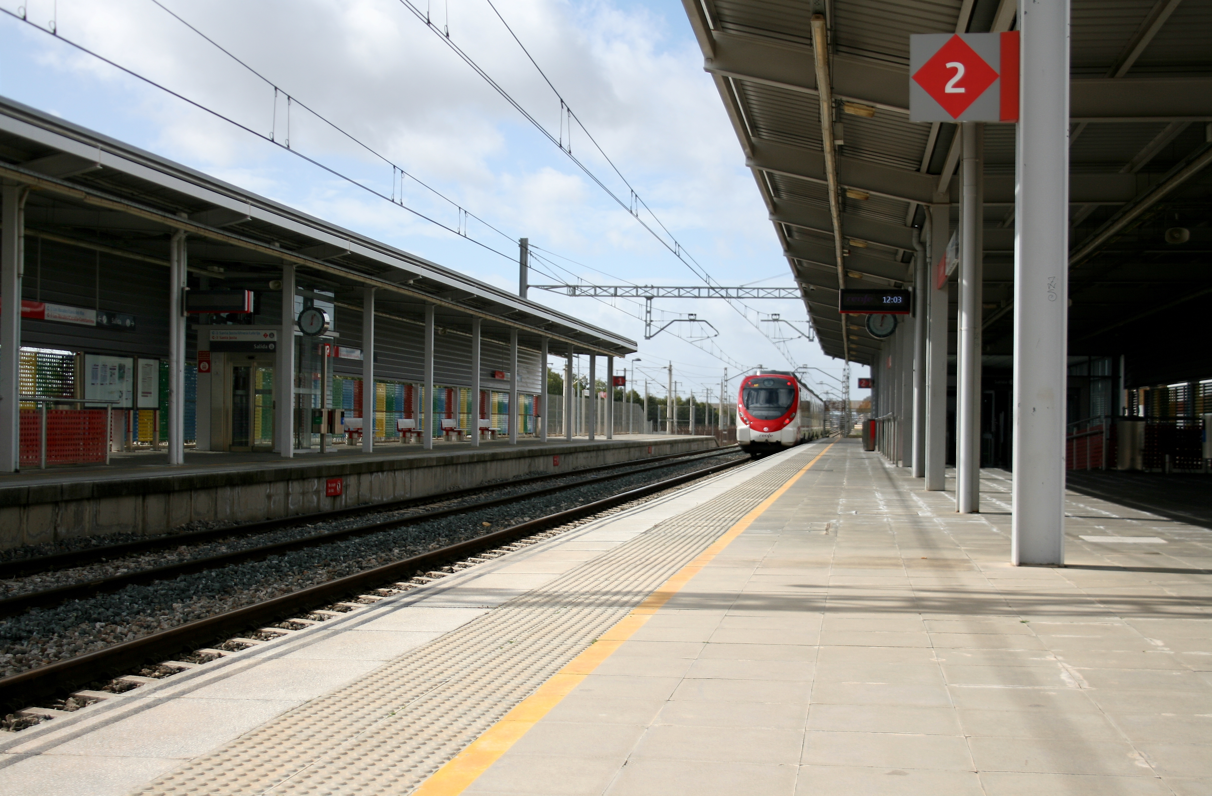 Estación de Cercanías de El Cáñamo / San José de La Rinconada